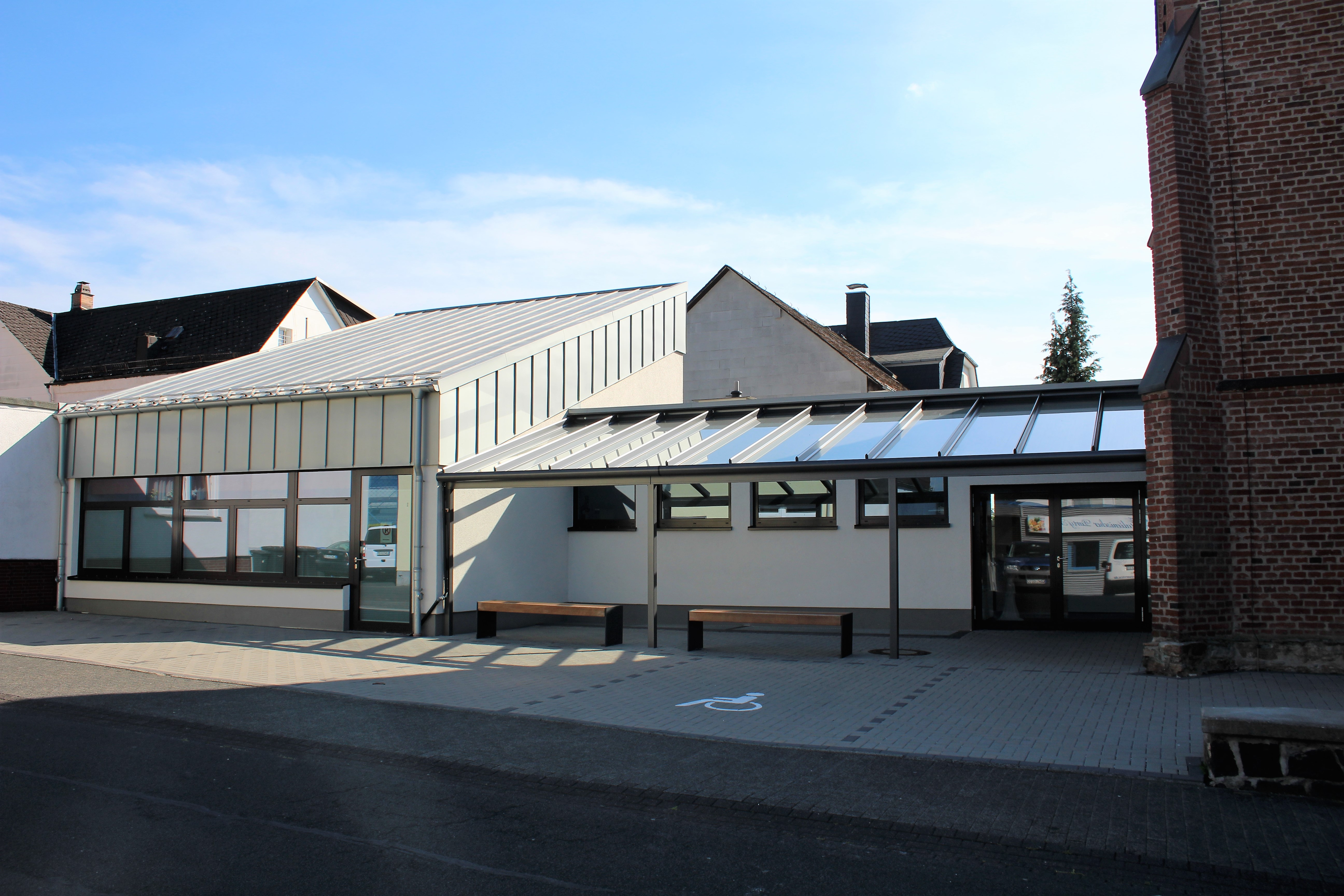 Ev. Kirche Wissenbach, Gemeinde Eschenburg, Hessen, Deutschland